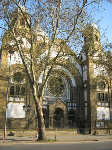 Synagoge de Novi Sad, Serbie, province autonome de Voïvodine